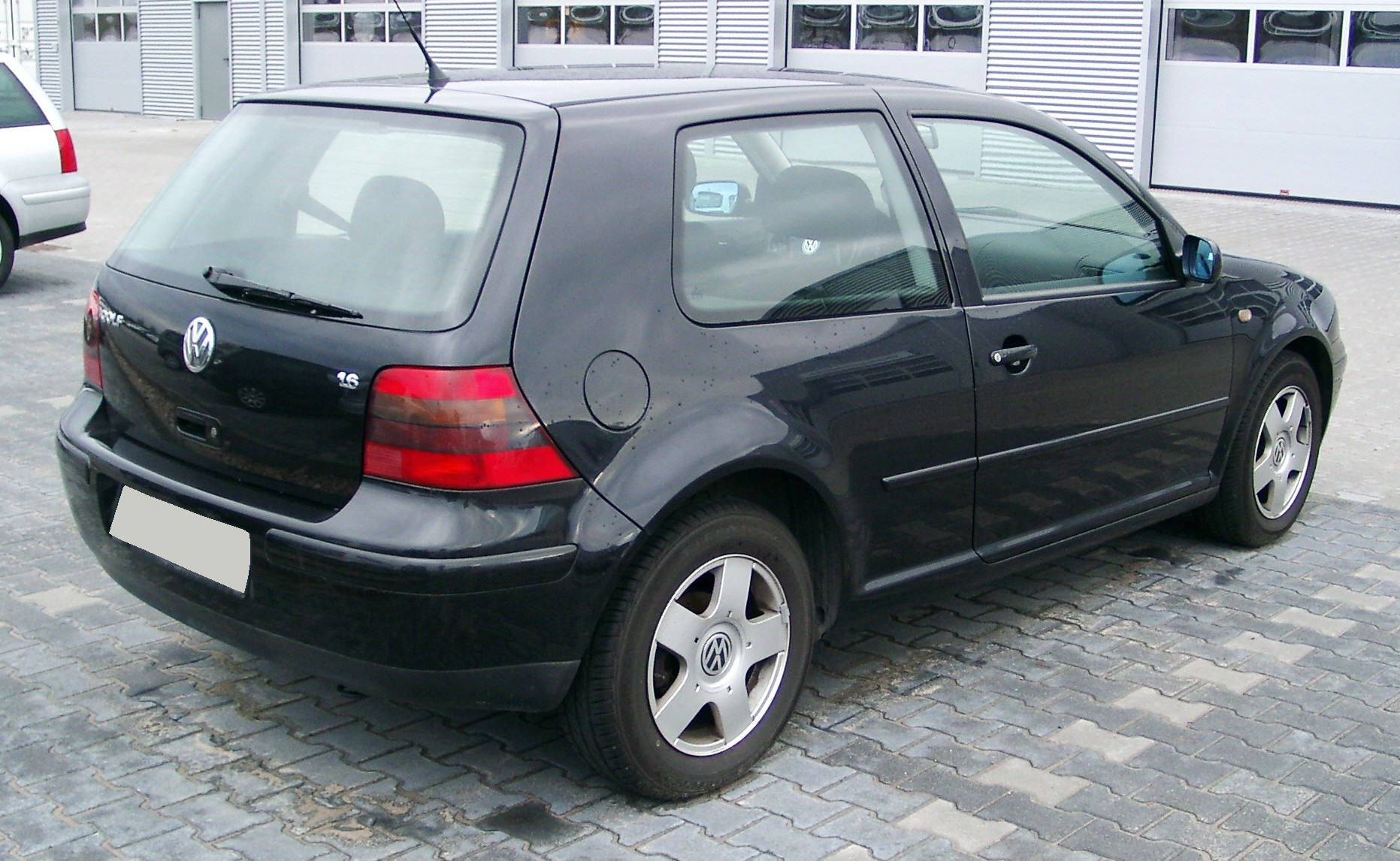 VW Golf IV